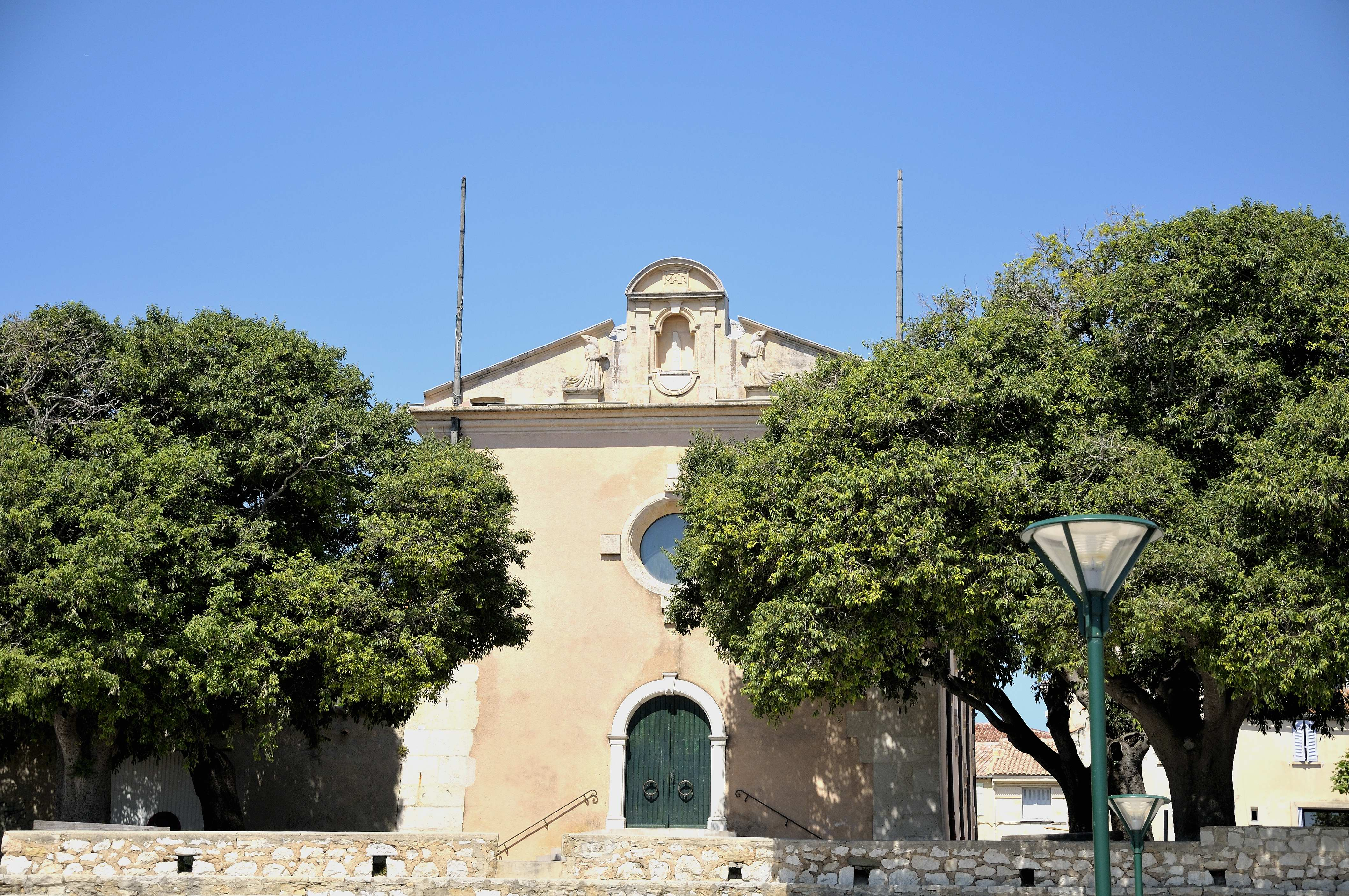 Chapelle des pénitents bleus de la Ciotat